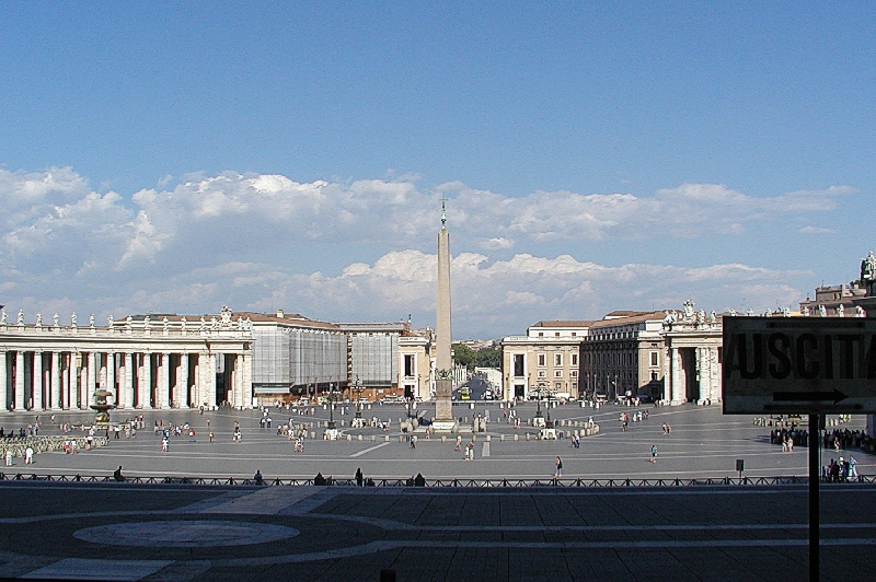 Bilder aus Rom